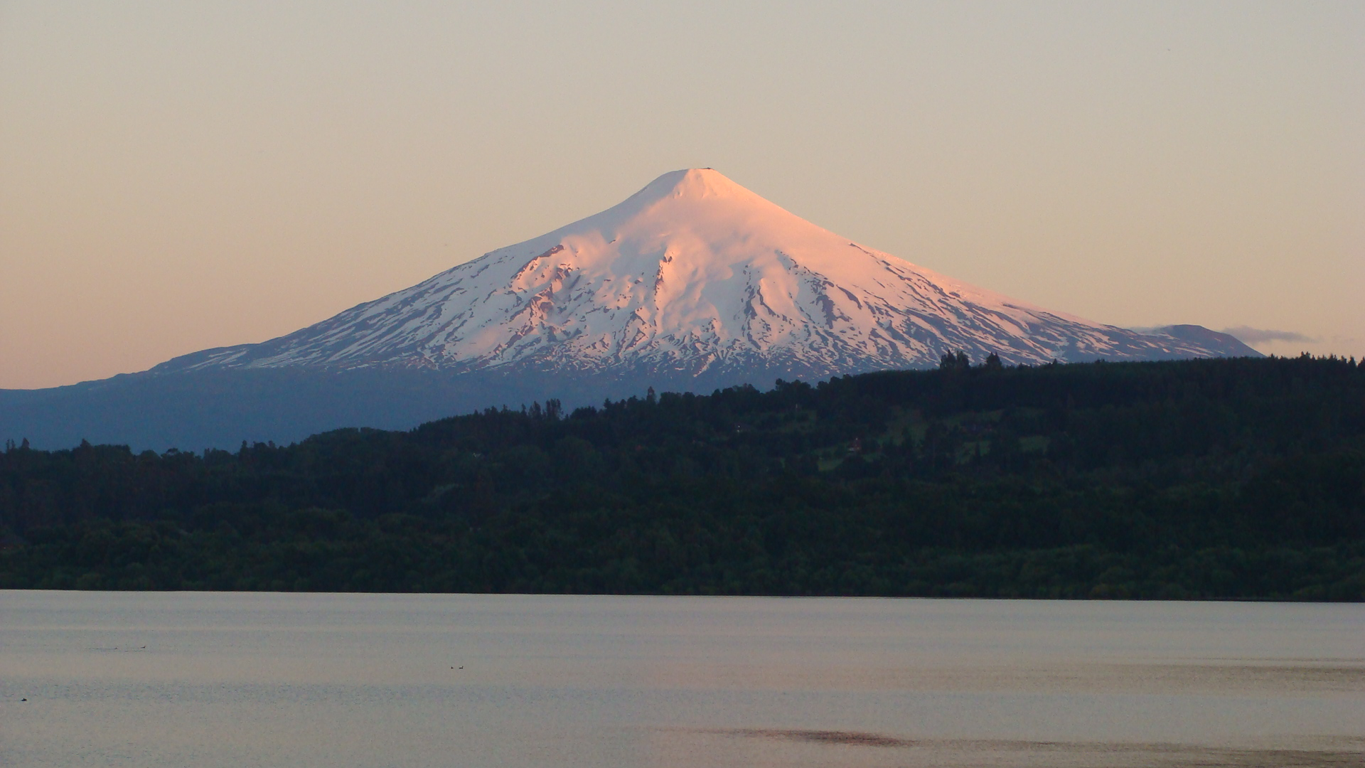 Sitio de Villarrica